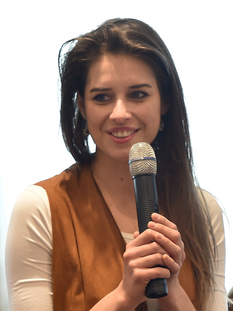 Simona Martausová, tlačová konferencia k 9. ročníku ankety "Slovenka roka 2017"